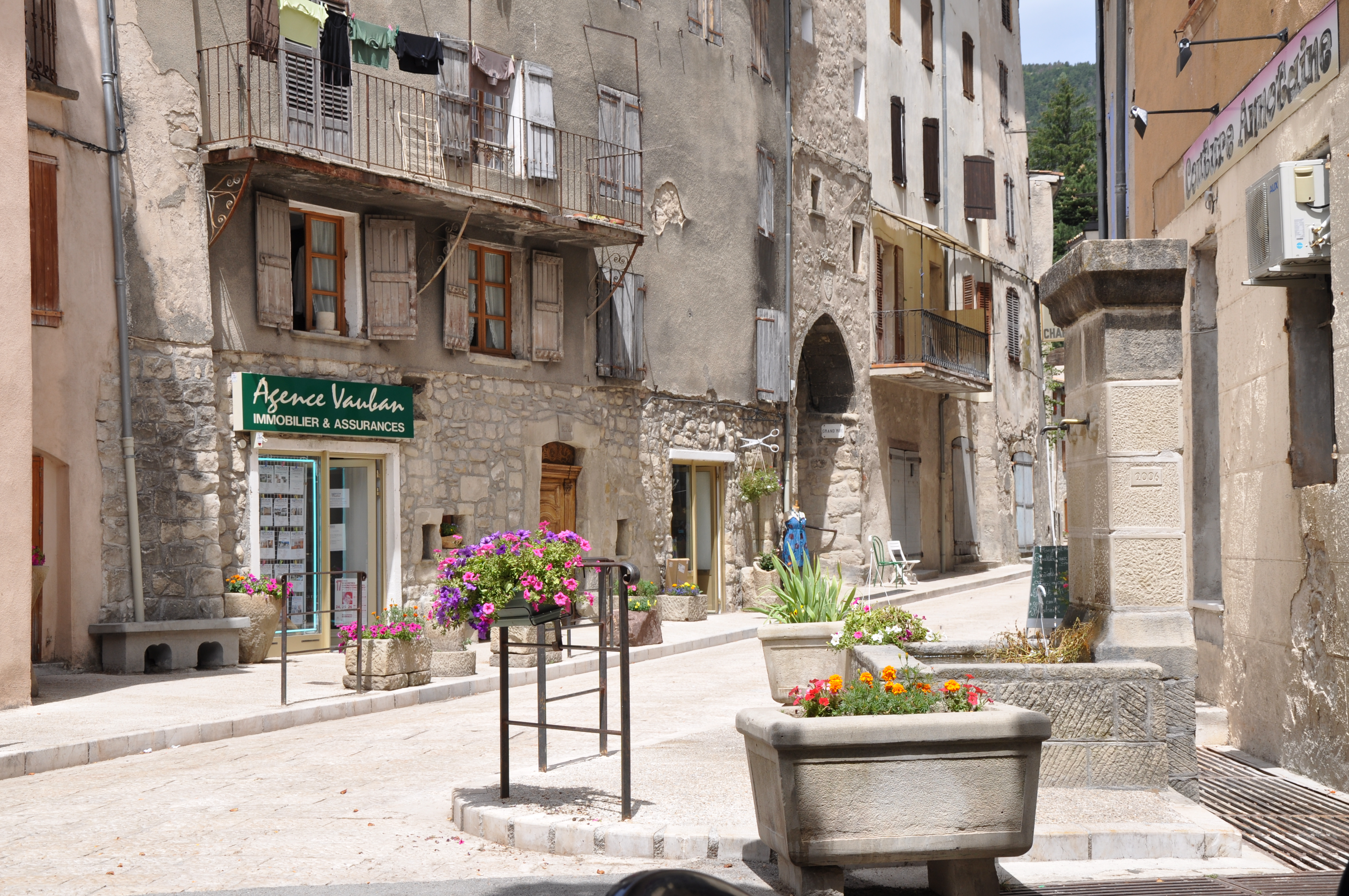 Annot, vieille ville